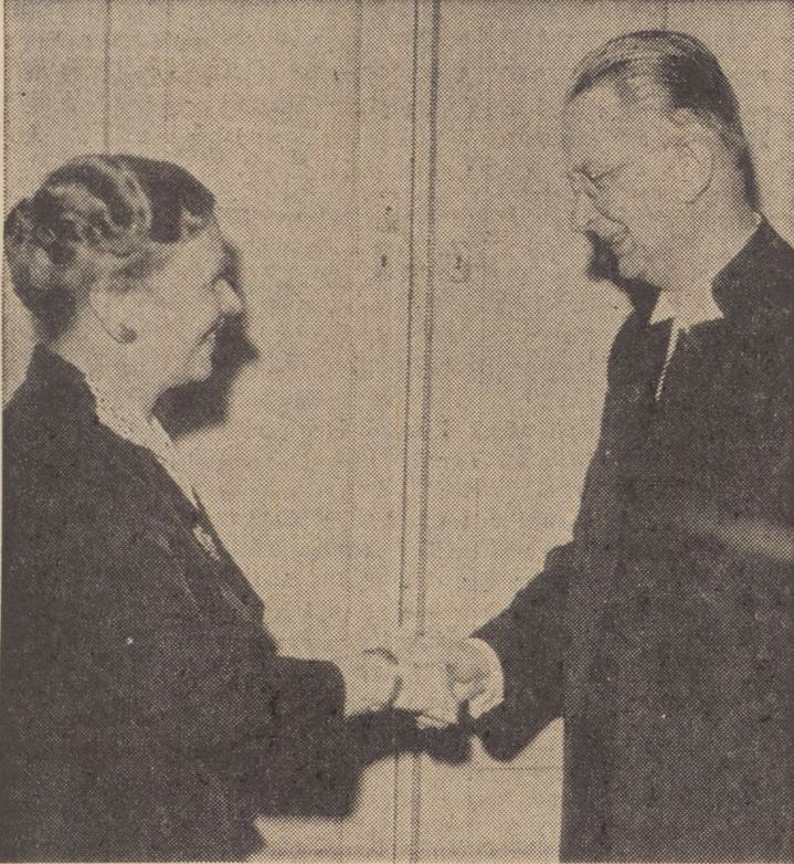 Rektor Jenny Rollin (1902-1971) och kyrkoherde K O Thunqvist (1898-1972)